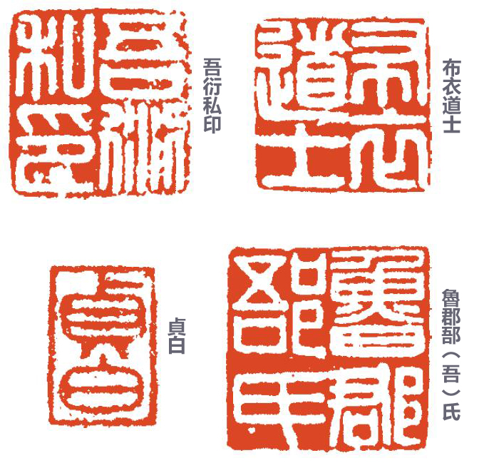 中文（台灣）: 吾丘衍篆刻作品